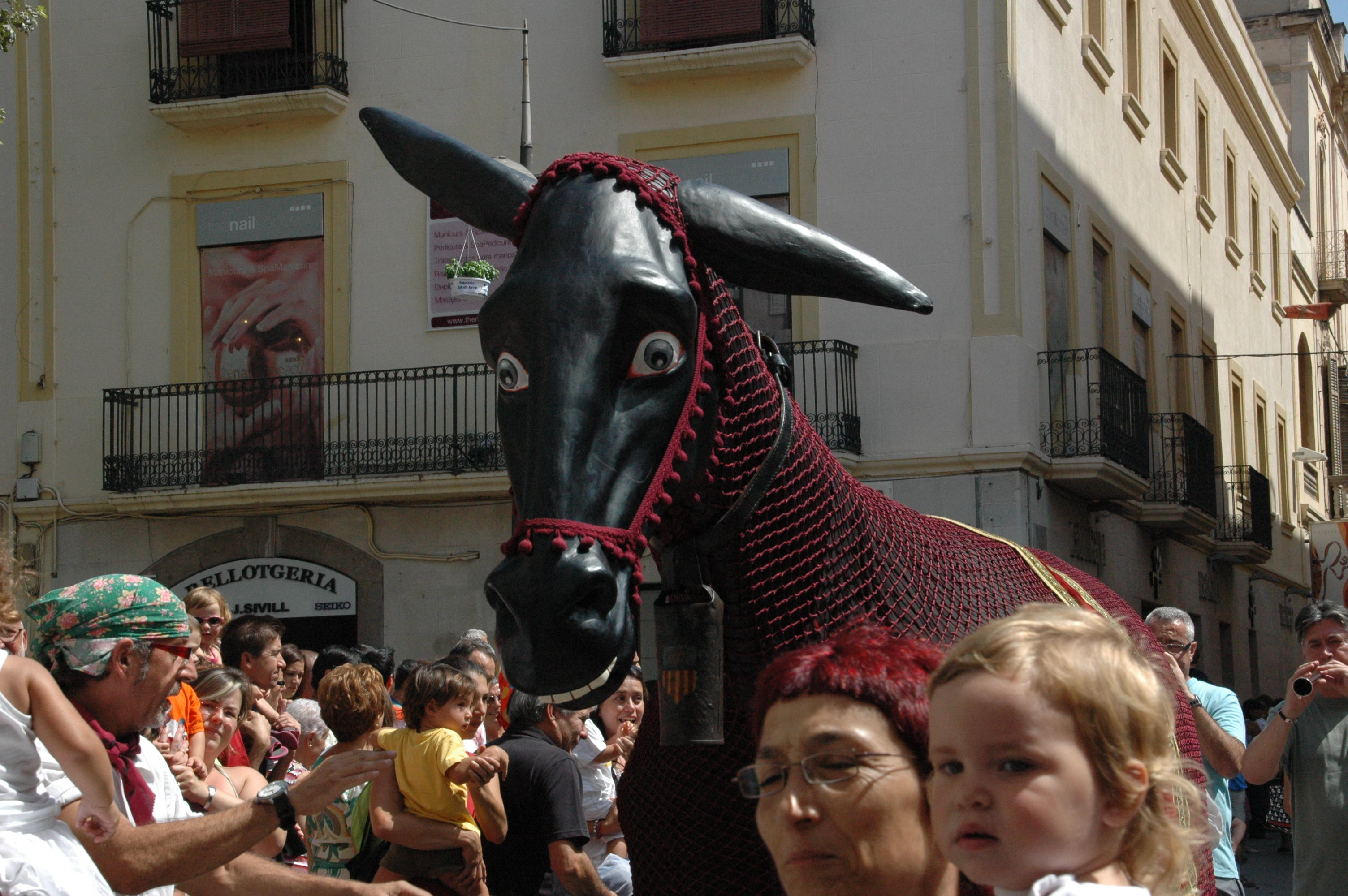 Festa major Vilanova